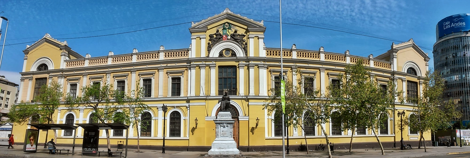 Casa Central de la Universidad de Chile This is a photo of a national monument in Chile: 819